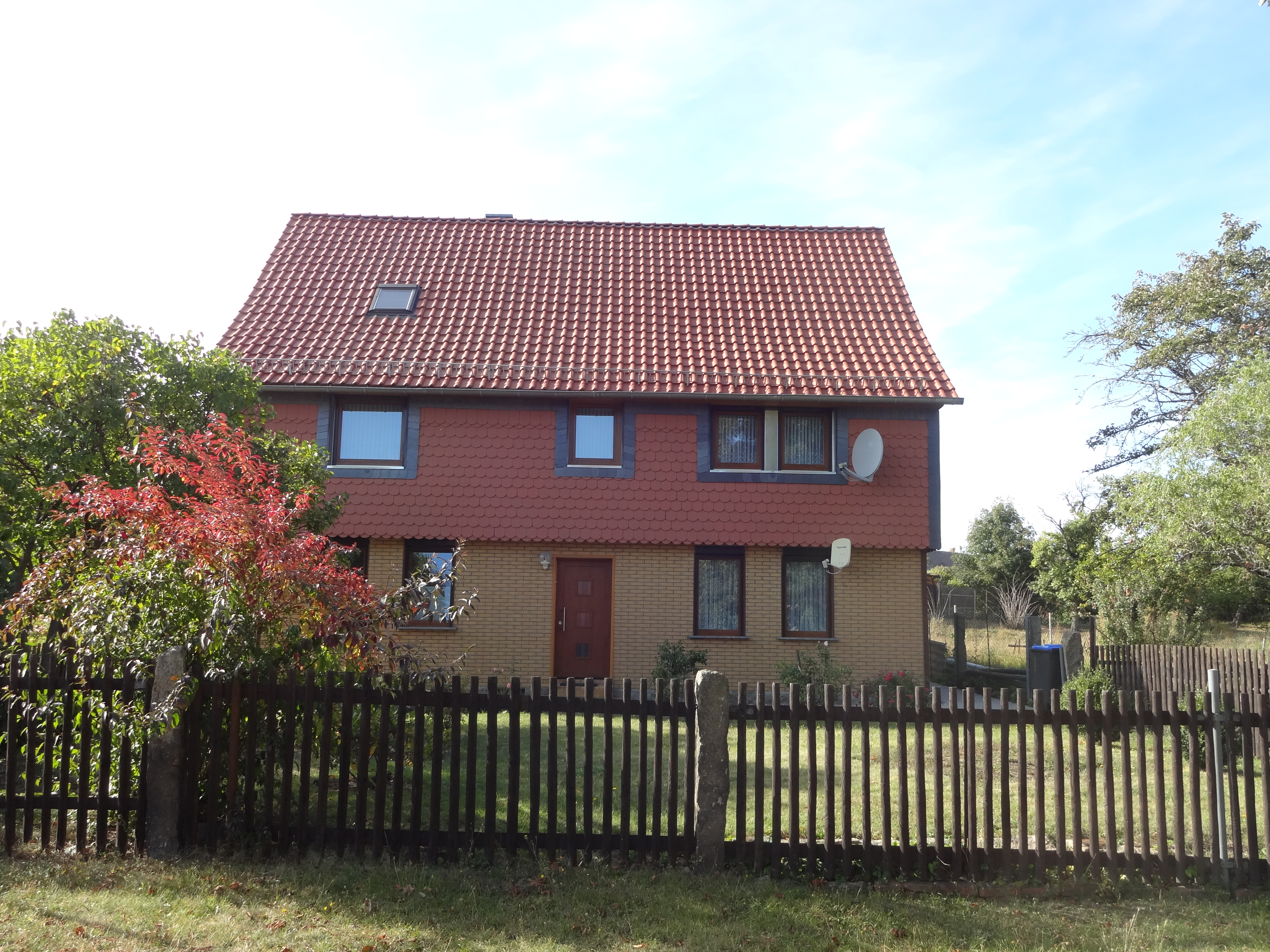 denkmalgeschütztes Wohnhaus in der Ilsenburger Straße 1 in Drübeck